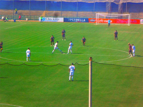 l'Aquila riprende il gioco dopo aver subito il primo gol della partita dalla Salernitana